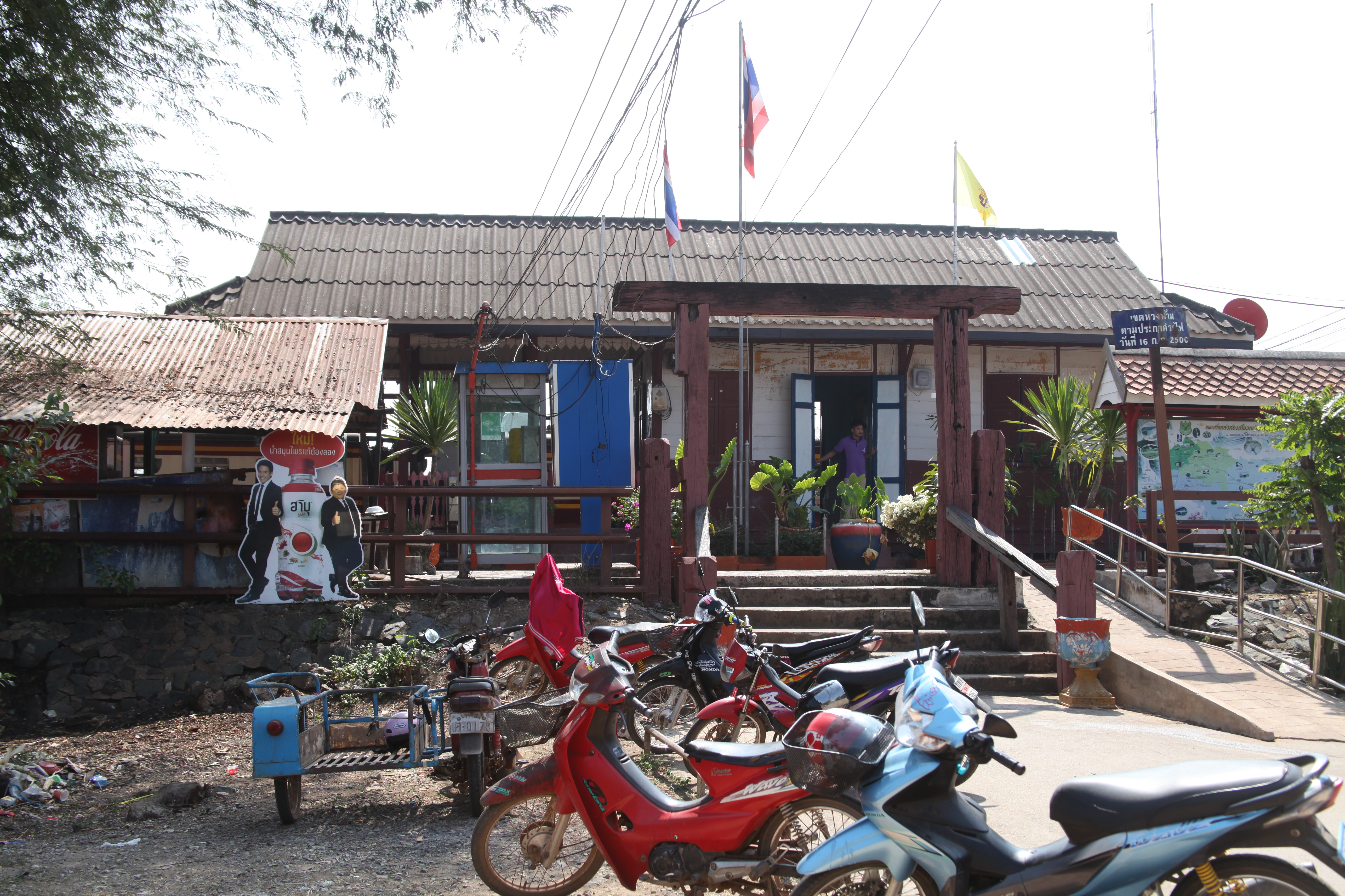 カビンブリー駅